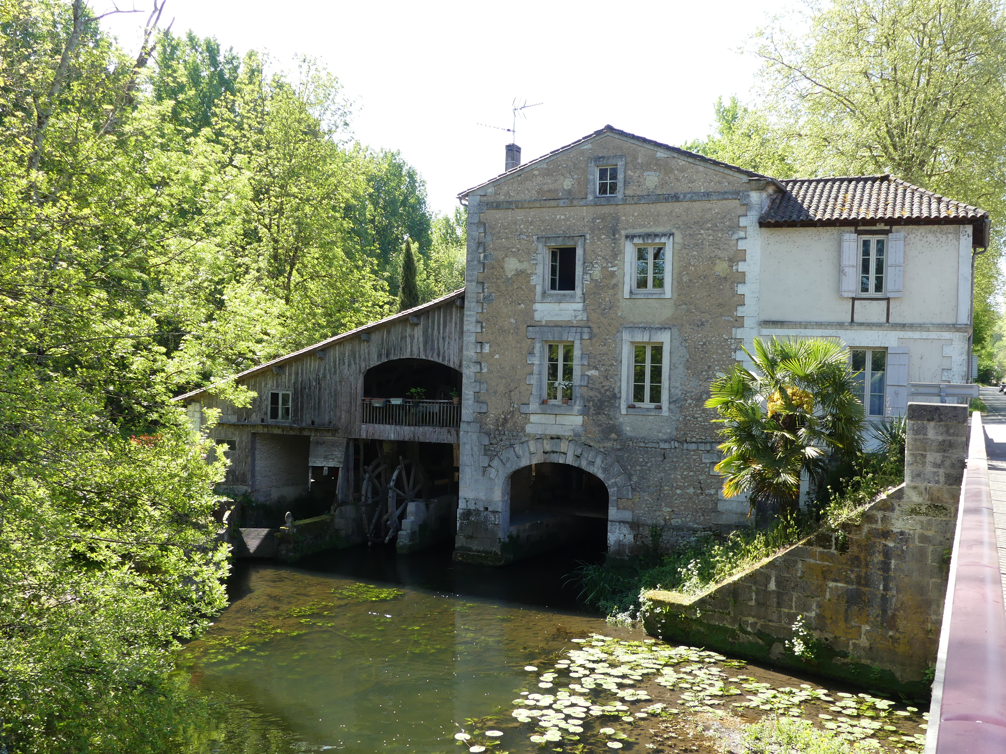 Ancien moulin à eau sur l'attier (bras secondaire) de la Dronne, Villetoureix, Dordogne, France.